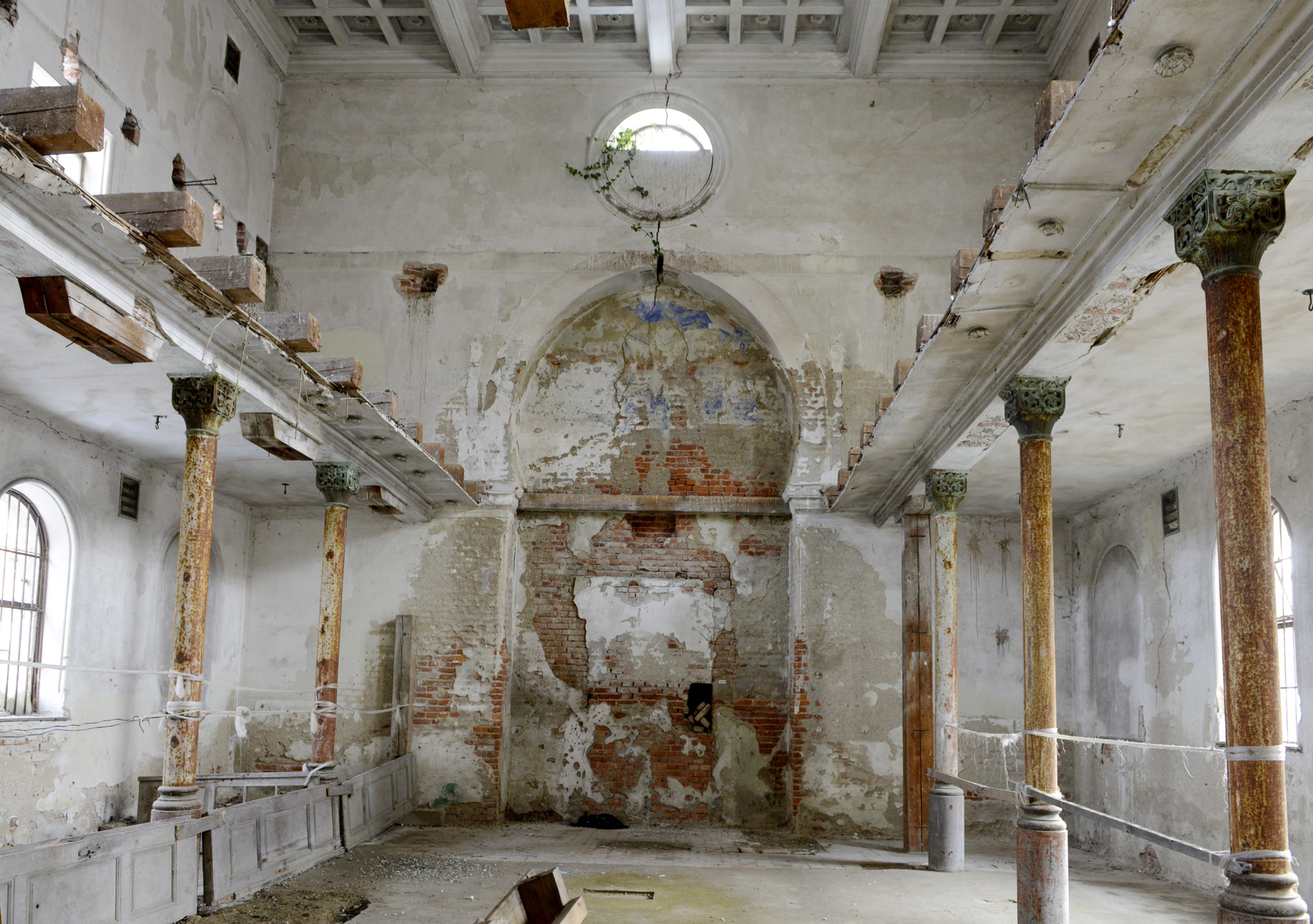 Synagóga v Senci